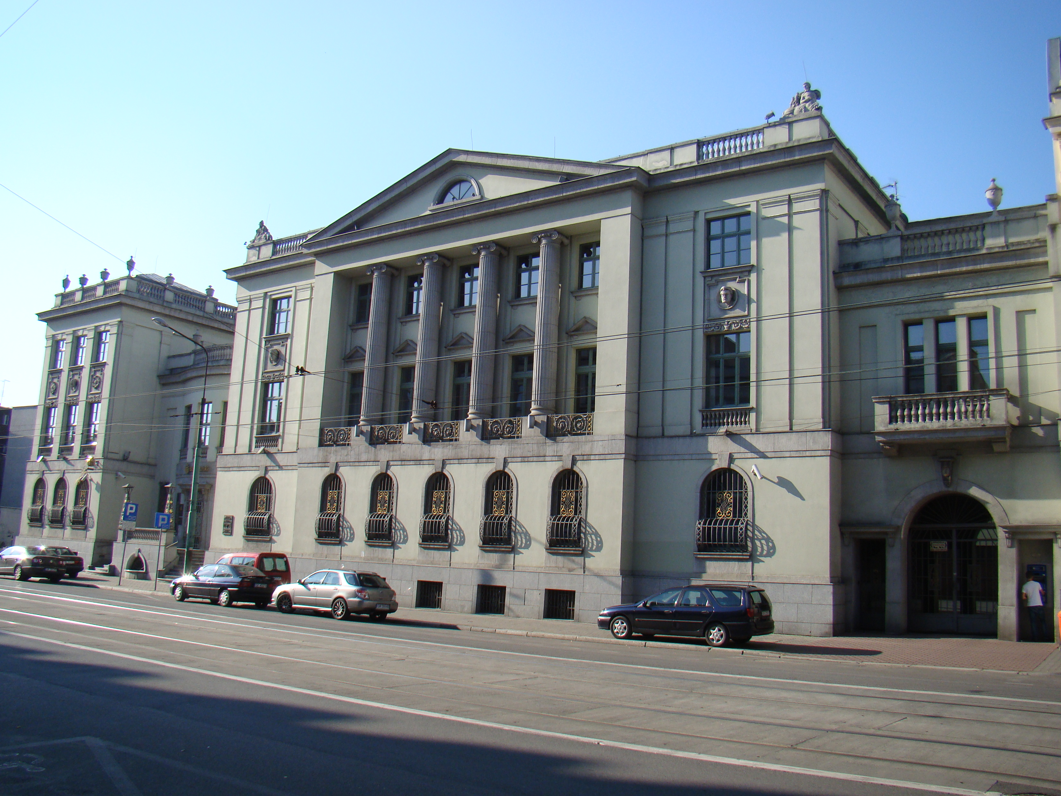 Katowice, Bank Spółek Zarobkowych, ob. NBP, 1923